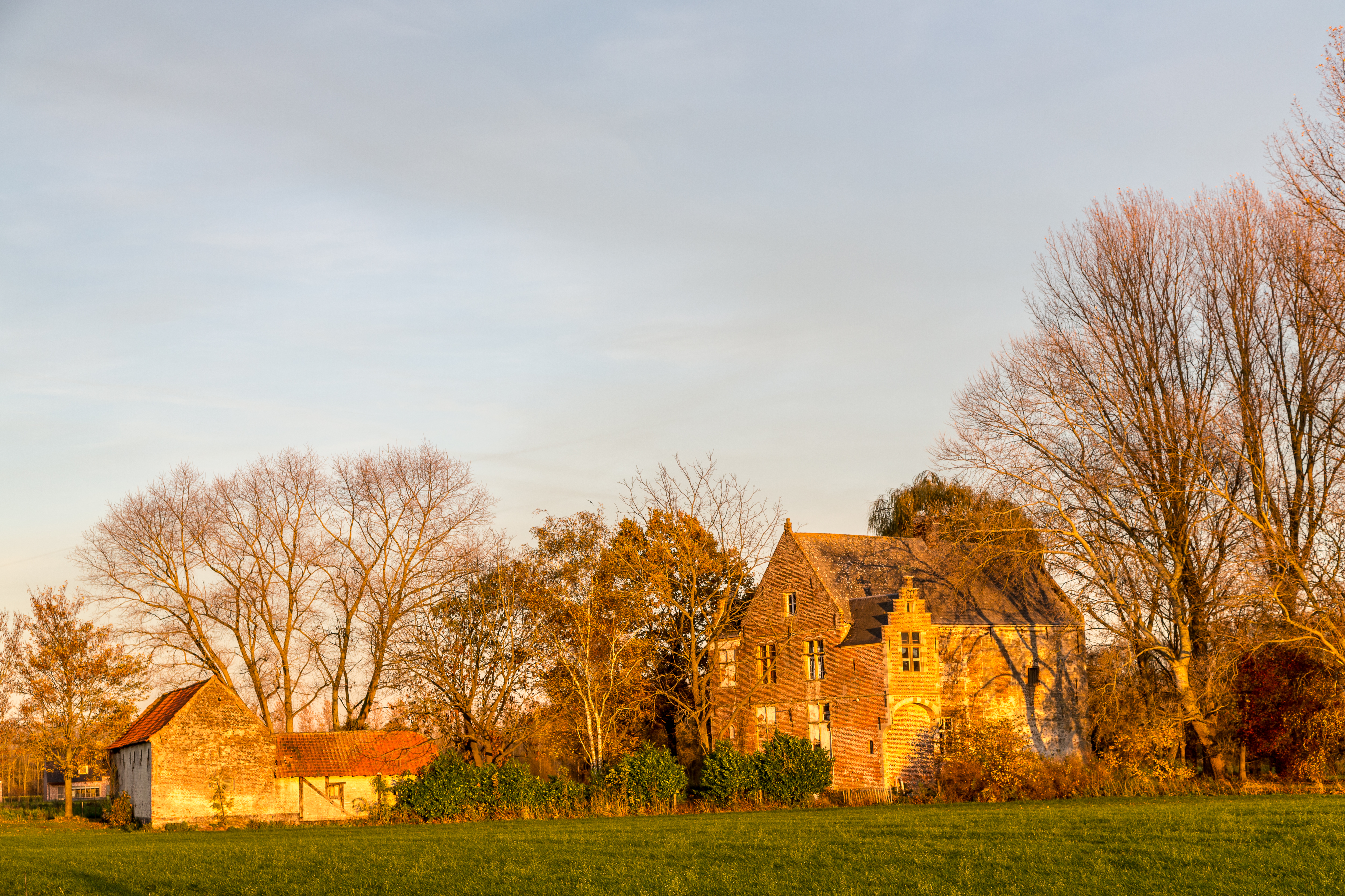 Kasteel zogenaamd "Ter Donck(t)", ook wel "Goed ter Donct", Kluisbergen ( Berchem ) This photo of immovable heritage has been taken in the Flemish Region